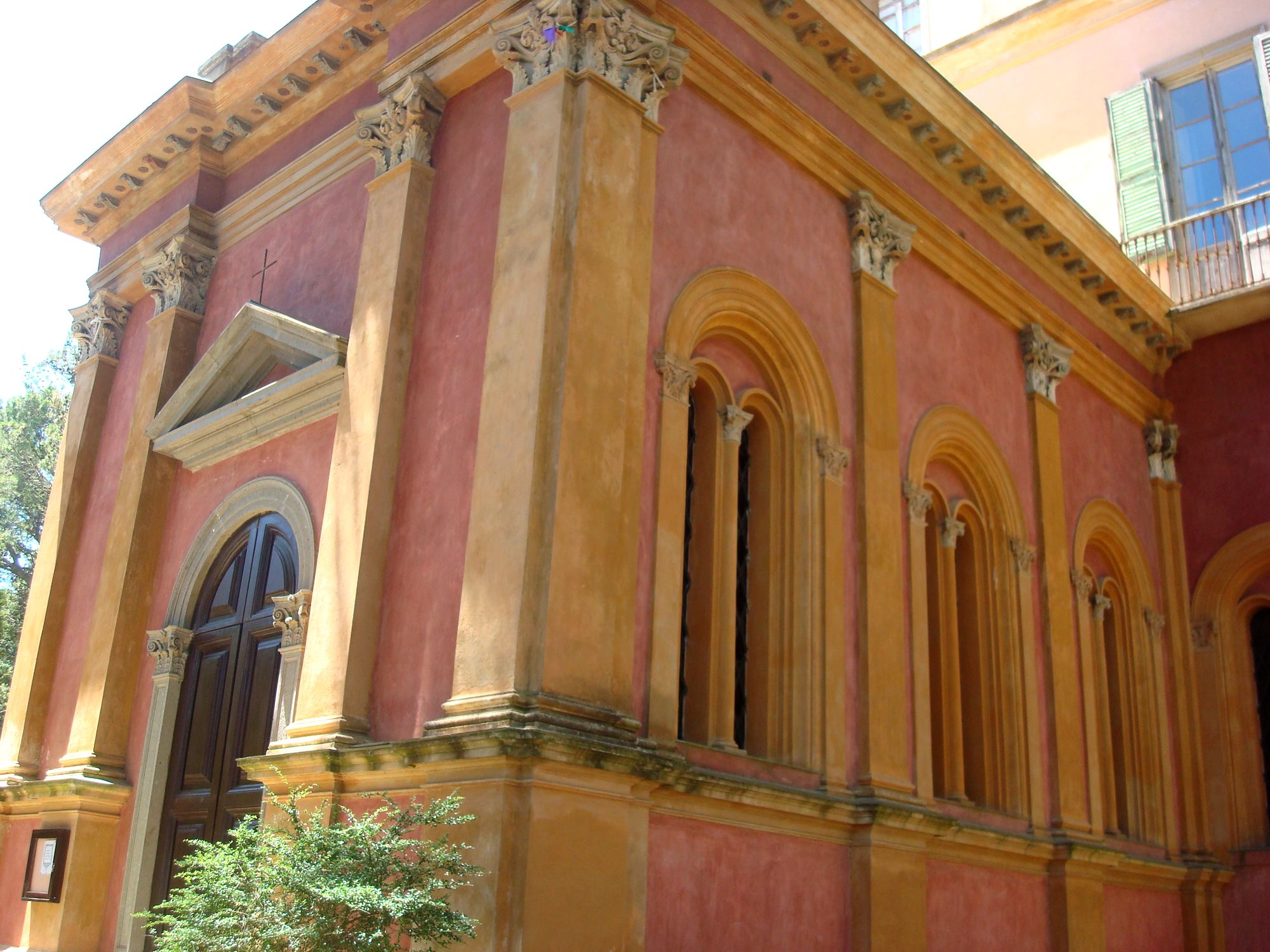 Cappella di Santa Barbara annessa al palazzo della Direzione della Miniera di Montevecchio, edificato tra il 1870 e il 1877.